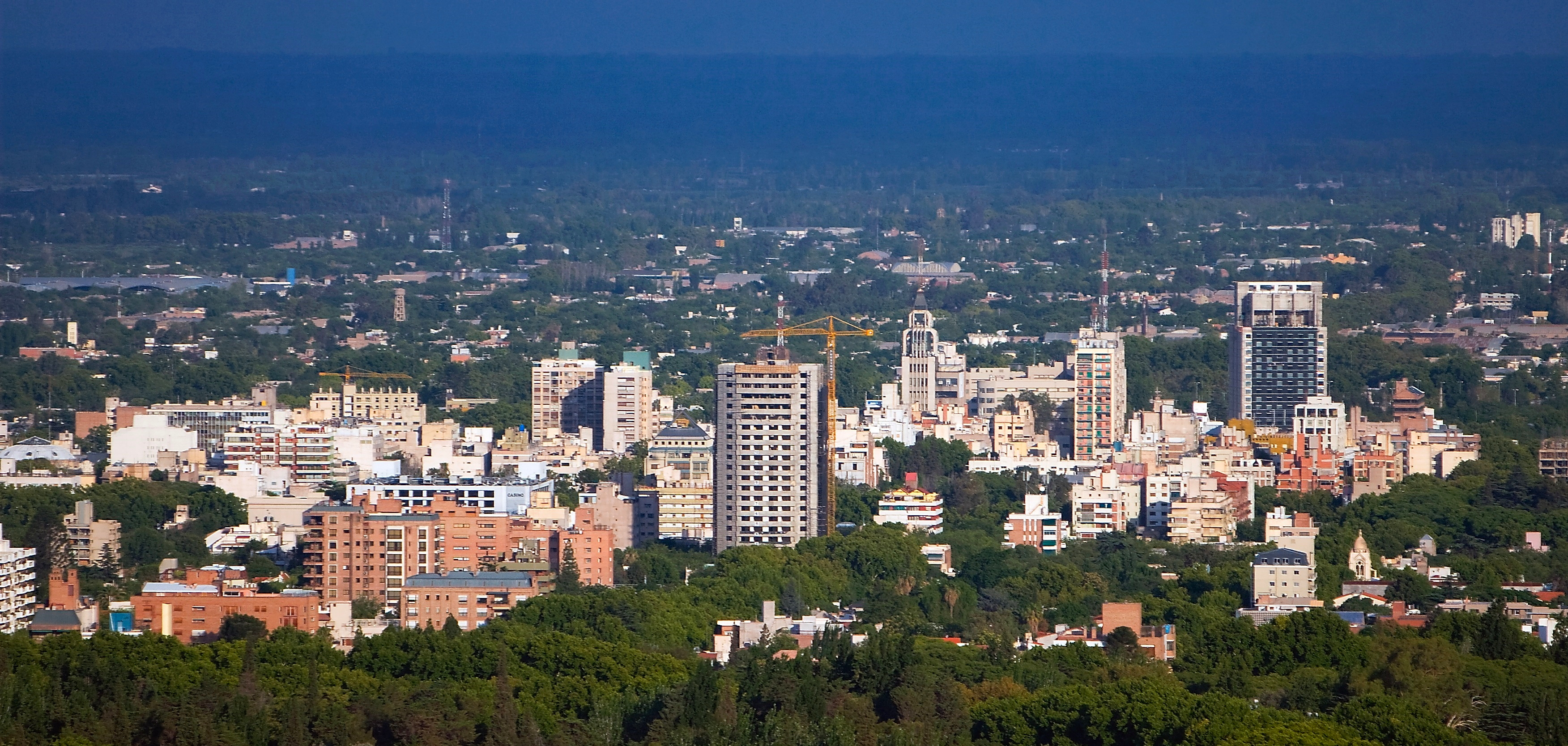 Panorámica Ciudad de Mendoza